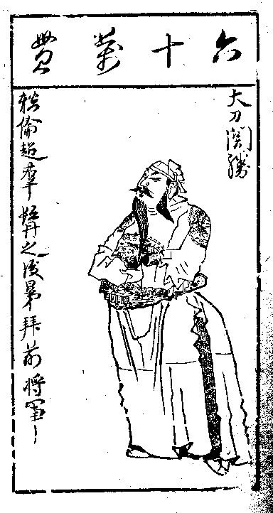 明 陈老莲 木刻版画 水浒叶子 关胜